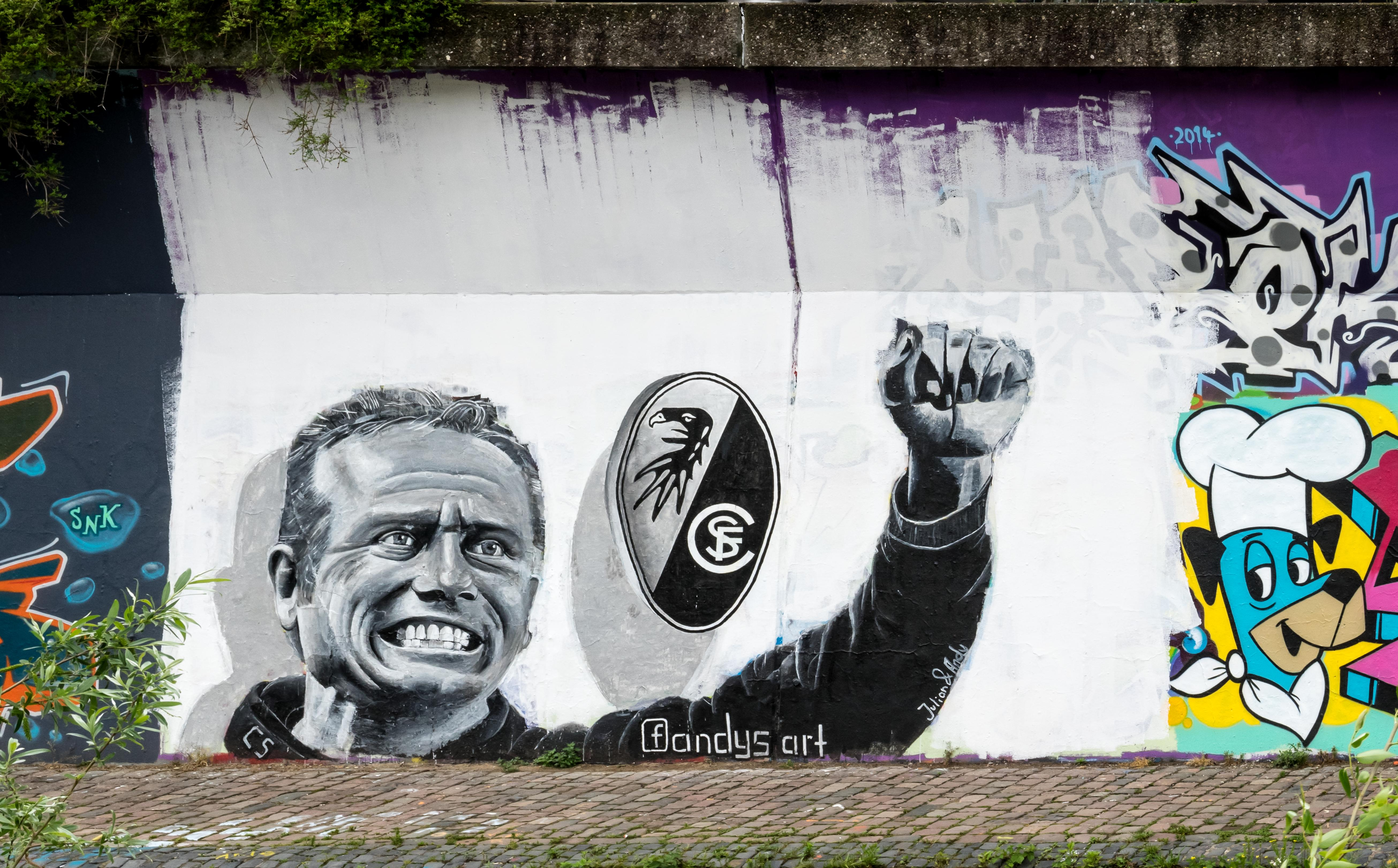 Bilder aus Freiburg im Breisgau Christian Streich auf einem Graffito an der Mauer von der Dreisam zur Leo Wohllebstraße. Andreas Herre ein 23 jähriger Künstler hat zusammen mit Julian Mielke dieses Graffito am 29.04.2014 zum Klassenerhalt im des SC Freiburg im Jahr 2014 gemalt. Grundlage war ein Bild aus 2012 aus einem Spiel gegen Hertha BSC. Die beiden Künstler studieren an der PH Freiburg. Quelle